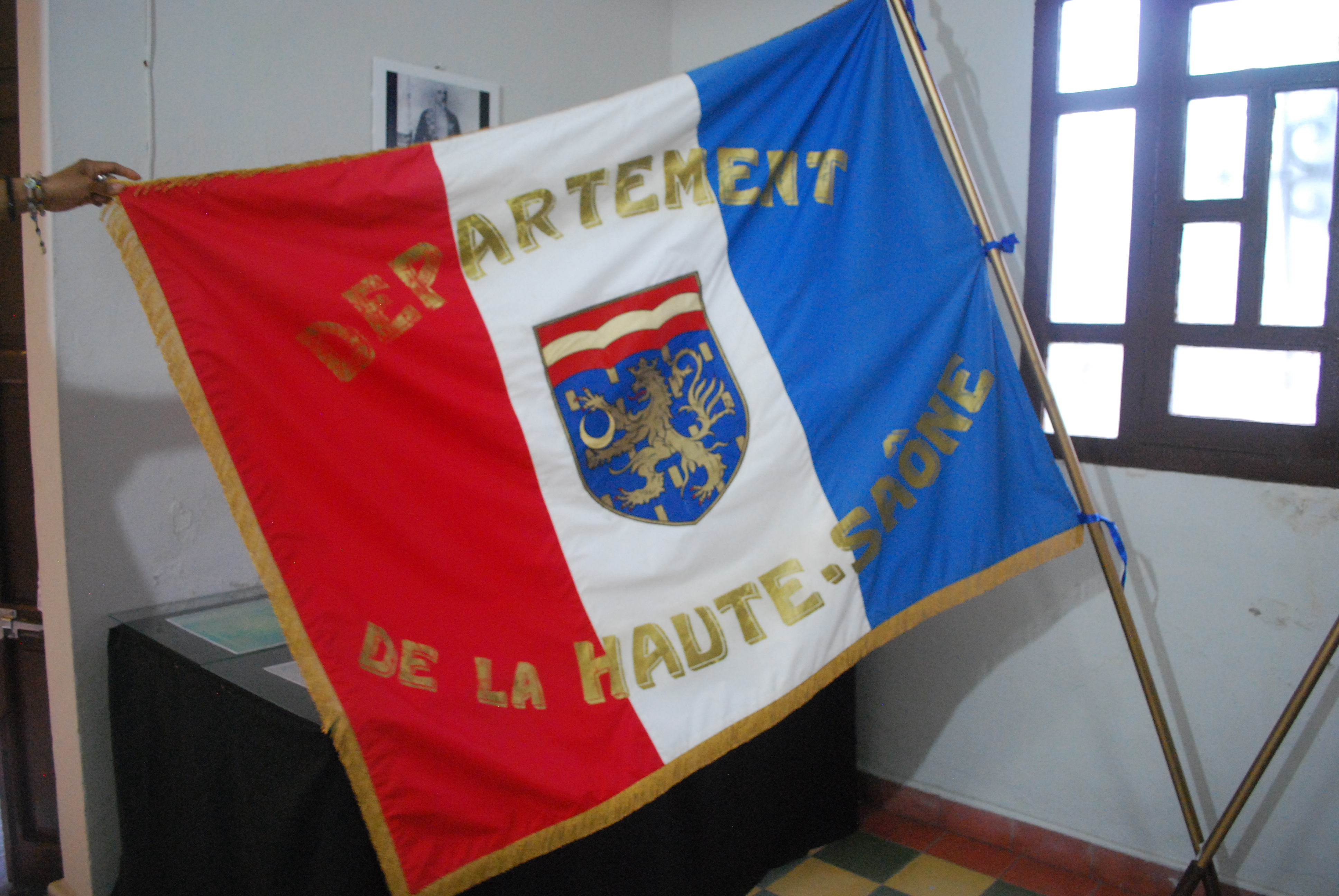 Haute Saone flag on display at the San Rafael Museum in San Rafael, Veracruz